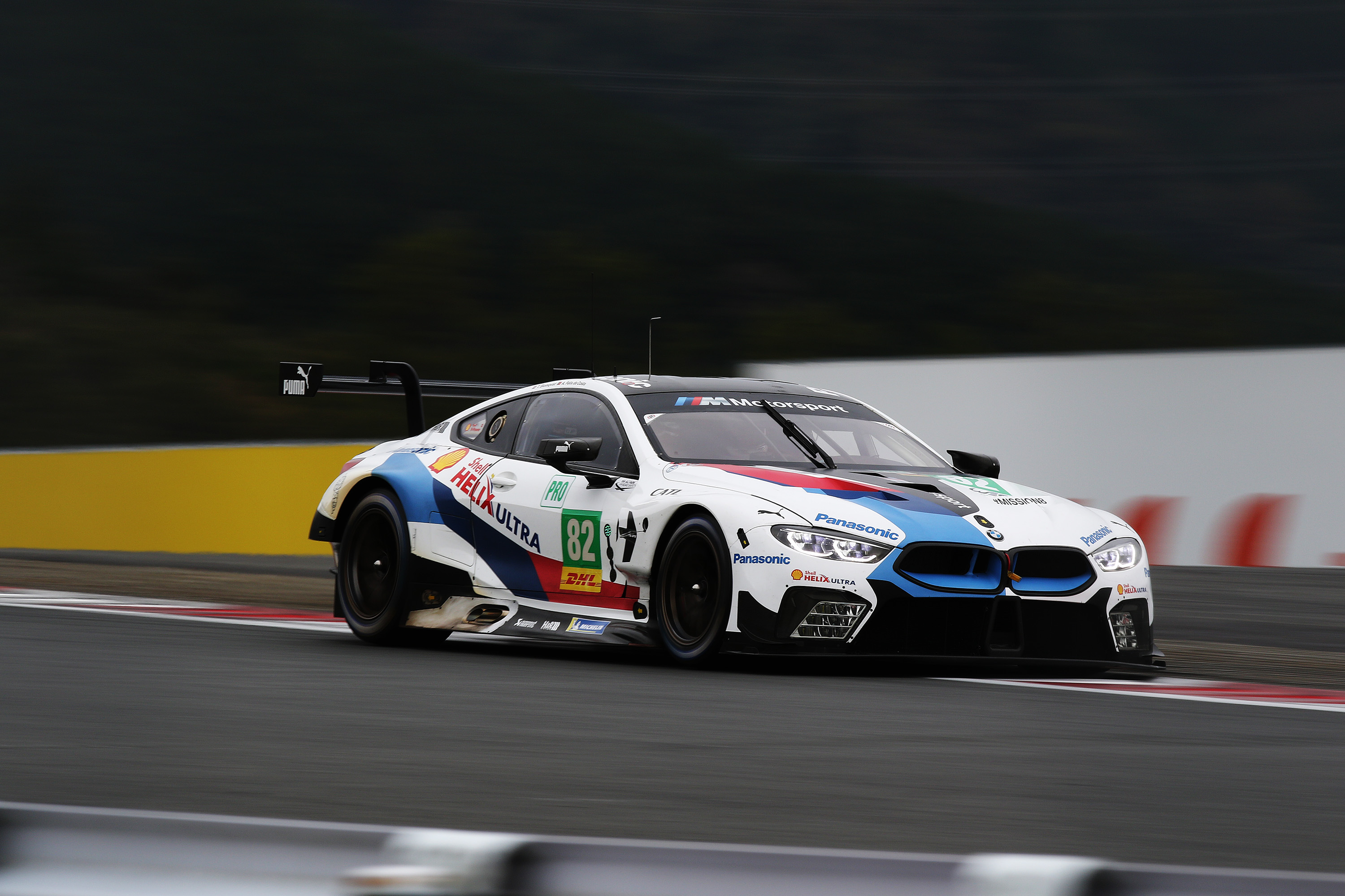 2018 6 Hours of Fuji.